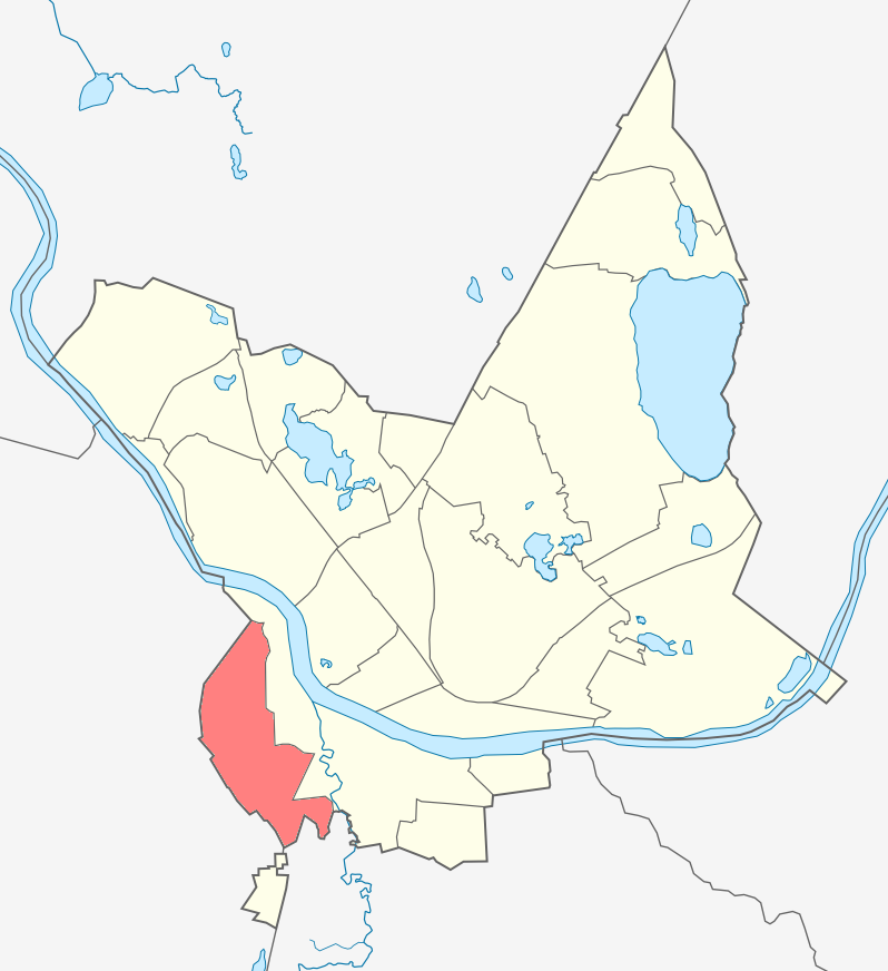 Микрорайон Нидеркуны карте Даугавпилса.